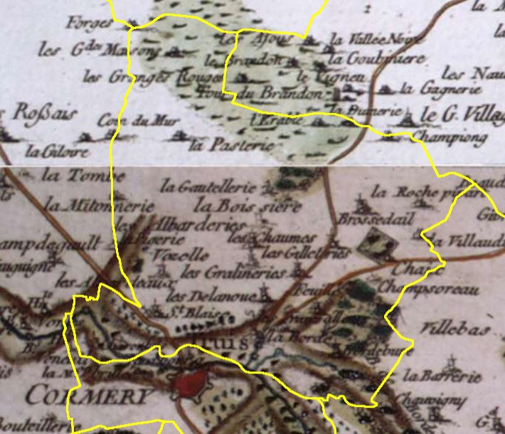 La commune de Truyes (limites en jaune) sur la carte de Cassini